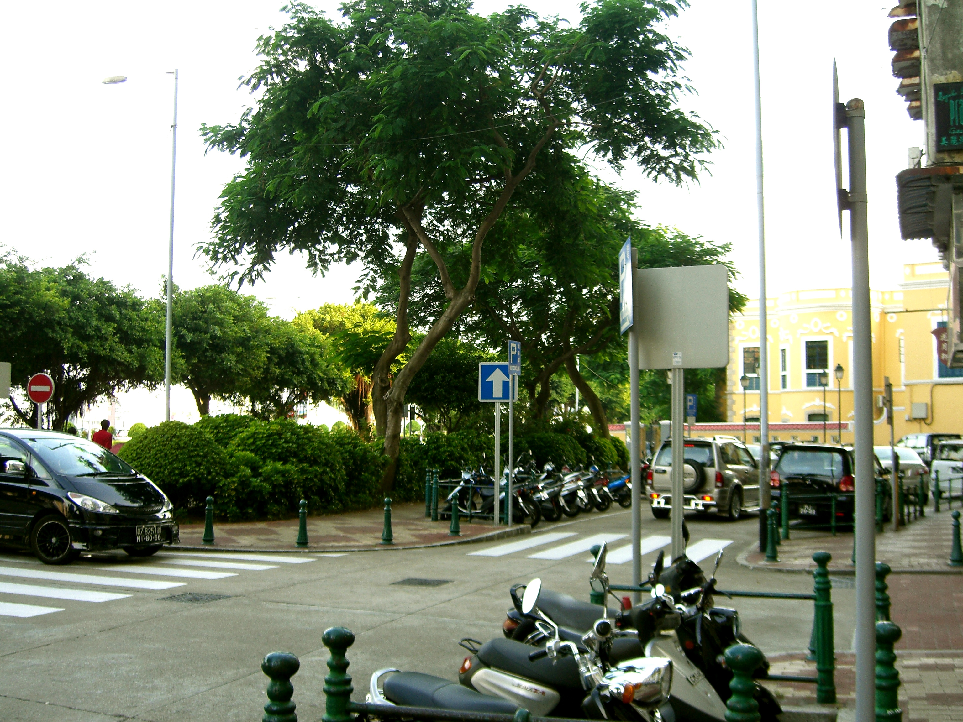 Povoação de Chunambeiro